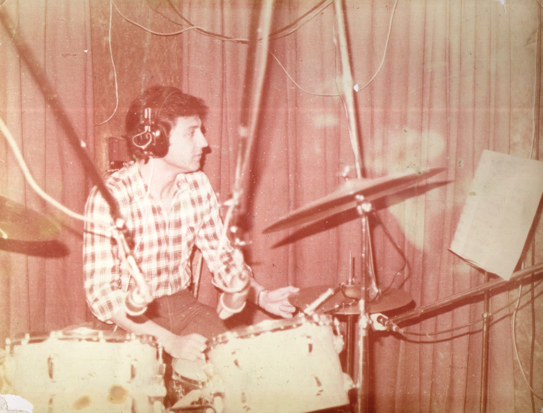 Eduardo García Caffi tocando la bateria en el estudio.